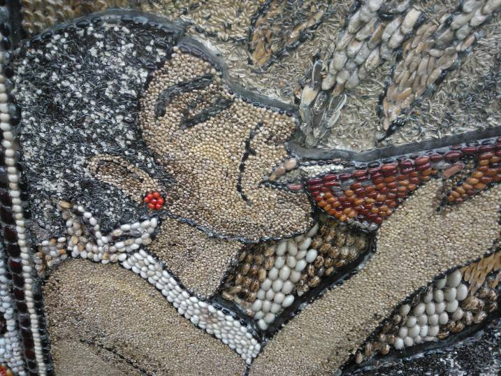 Tlahuicas_agricultura